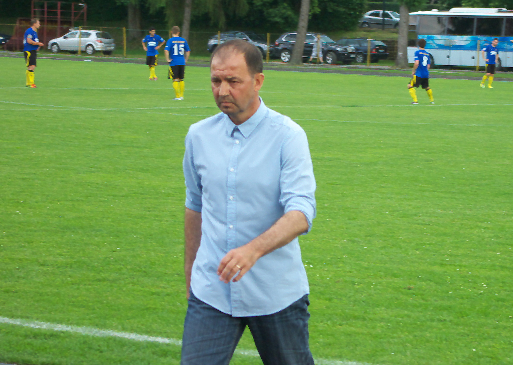 Ryszard Federkiewicz, trener Stali Sanok (2013)